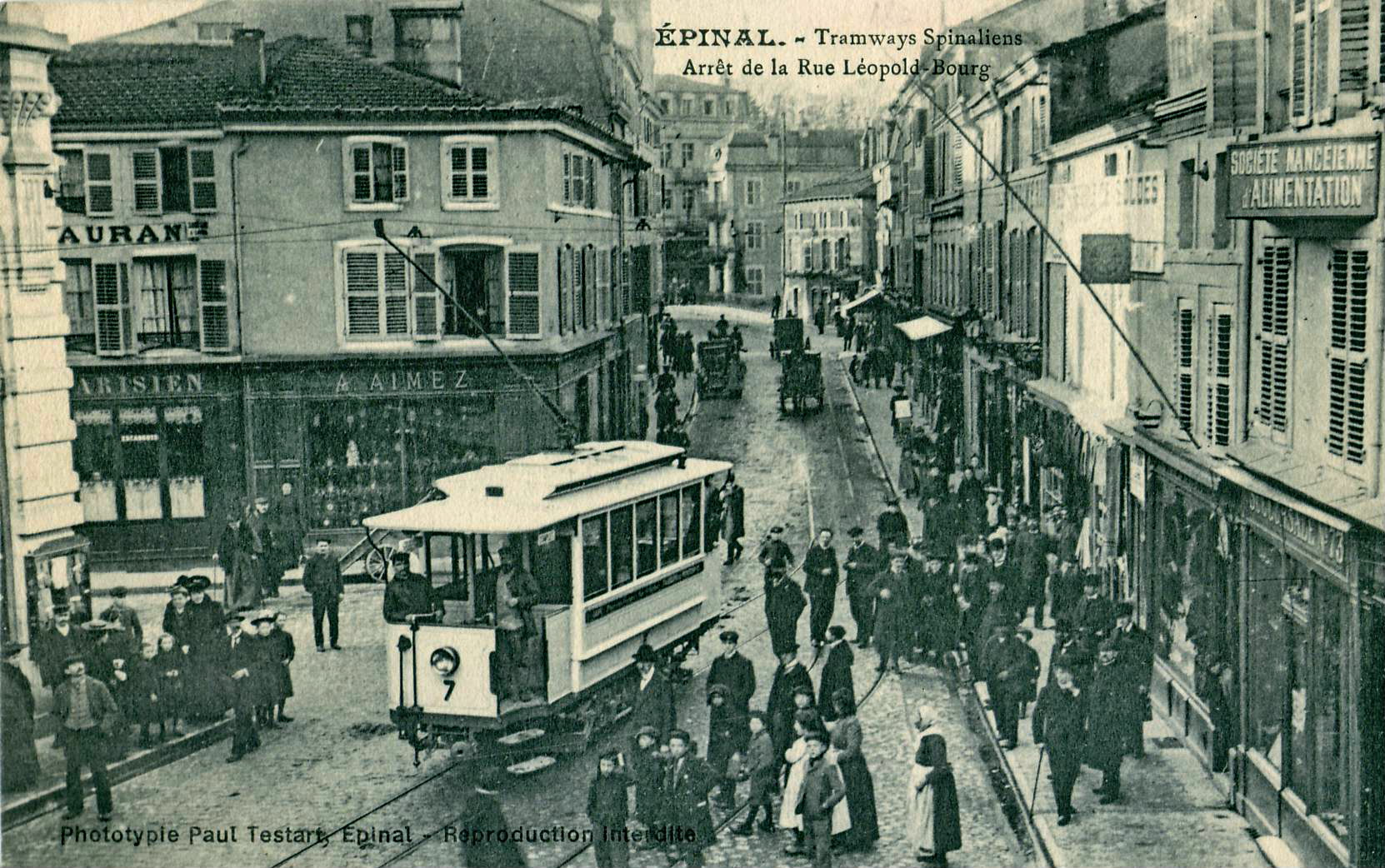 Carte postale ancienne éditée par Phototypie Paul Testart à Épinal : ÉPINAL - Tramways spinaliens - Arrêt de la rue Léopold-Bourg